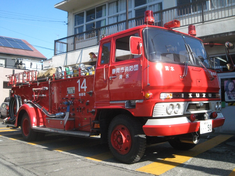 いすゞＴＸＤ50Ｅ改の水槽付き消防ポンプ自動車。1970年（昭和45年）式。2011年2月、静岡県にて、takoji135撮影。